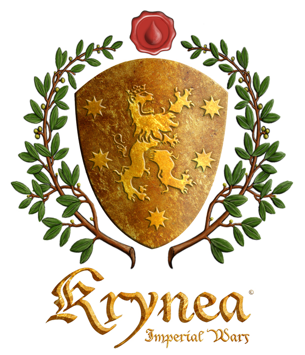 Logotipo oficial de Krynea Imperial Wars, juego de estrategia online para navegador web basado en el mundo de Krynea.